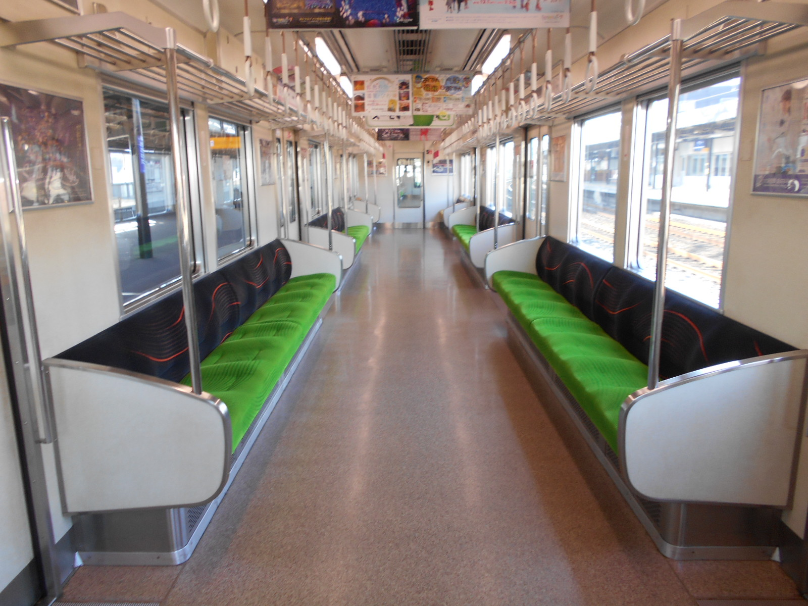 13000系と同じ座席モケットに変更された9005号車の車内